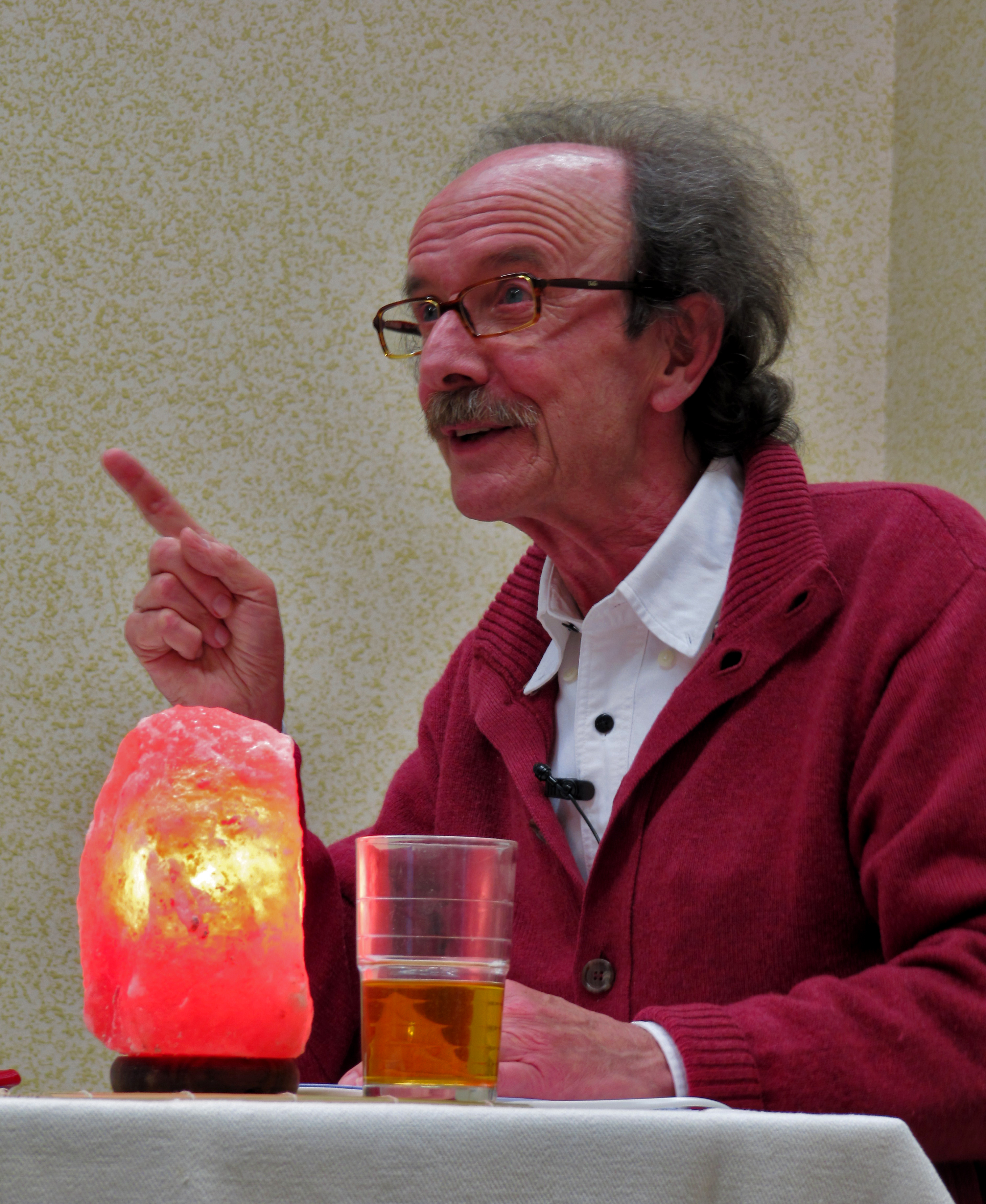 Joxean Artze idazlea 2011n.